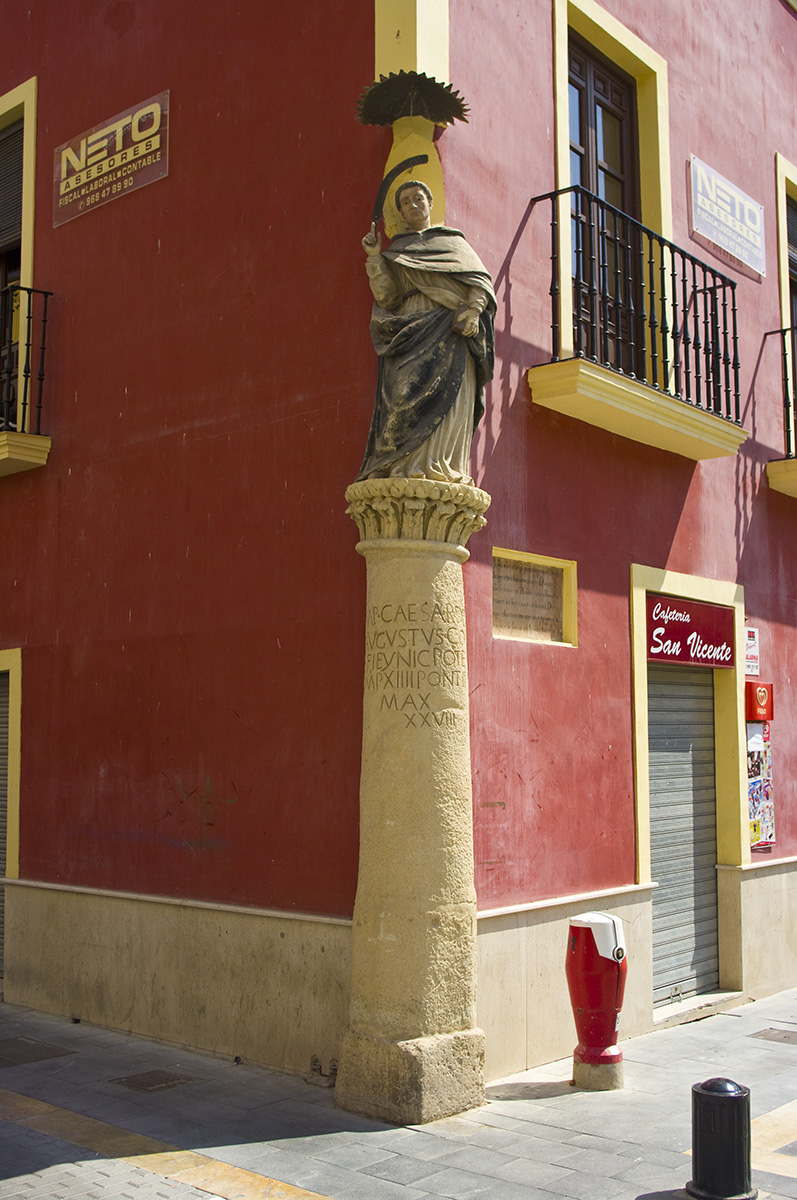 Réplica de la columna miliaria romana encontrado en la Calle de la Corredera en Lorca (Murcia) - original está almacenado en el Museo Arqueológico de Lorca - corresponde con CIL II, 04937 = MiliariTarrac 00024 : Imp(erator) Caesar div[i f(ilius)]/ Augustus co(n)[s(ul) XI]/ tribunic[ia] potes[t(ate) XVI]/ imp(erator) XIIII pontif(ex)/ max(imus) / XXVIII